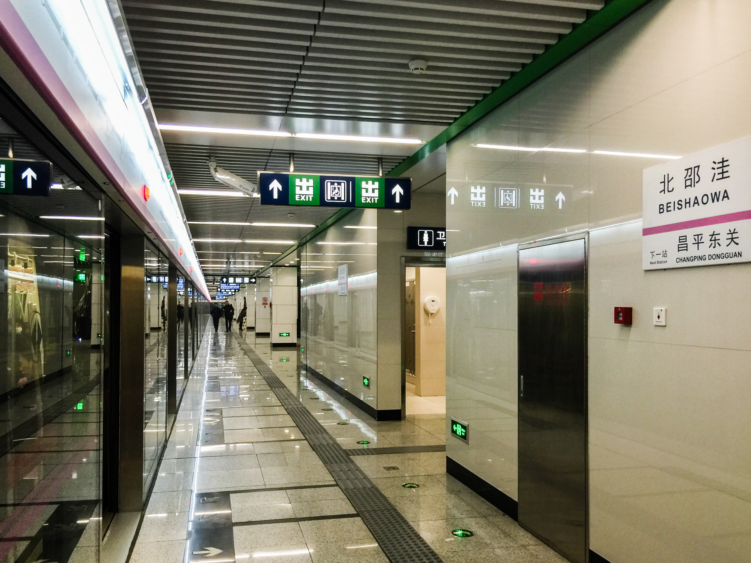 中文（中国大陆）: 北京地铁昌平线北邵洼站上行站台，2015年12月26日